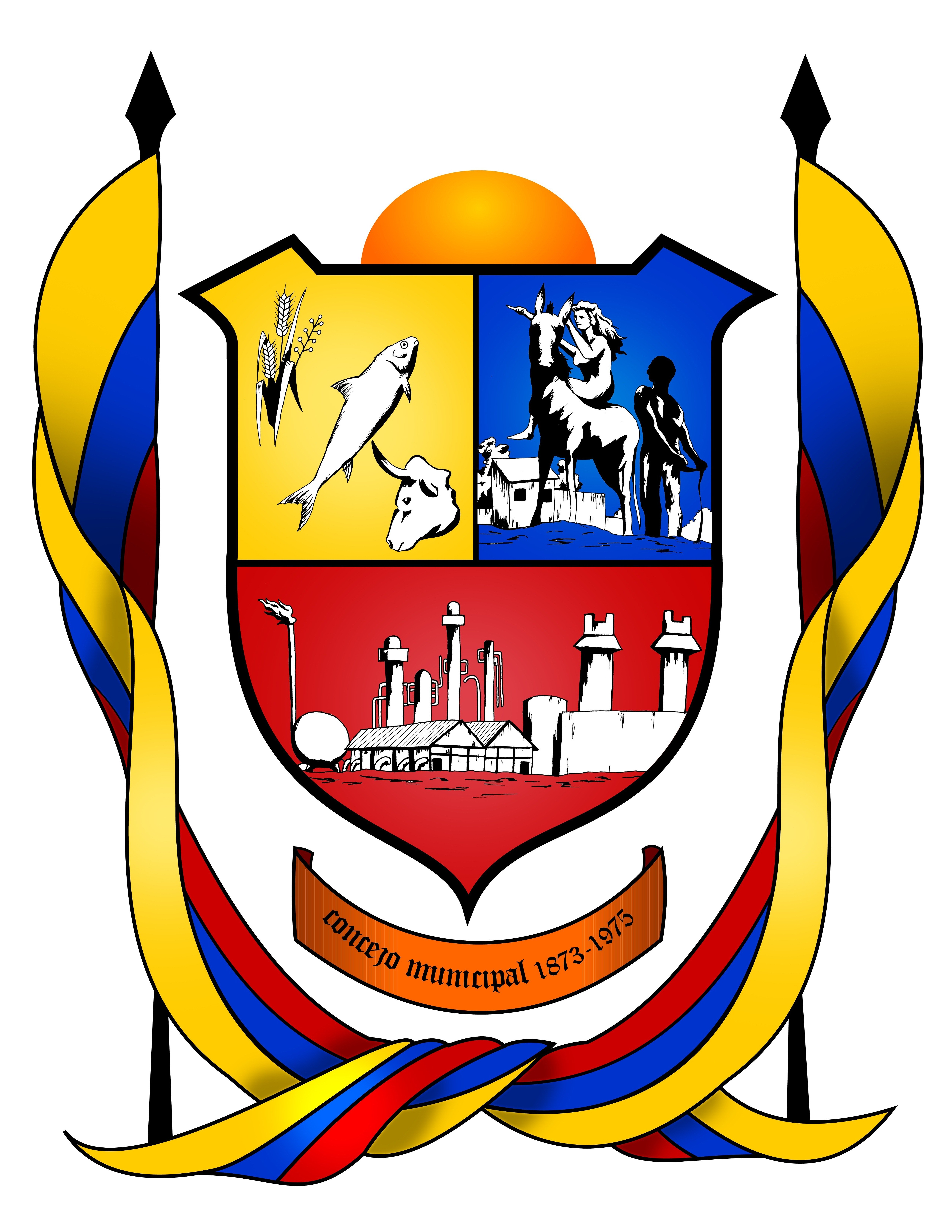 Fue creado en el año de 1975 por el dibujante, deportista y cantante mirandino Douglas Faría Matos. Lleva en su campo los colores amarillo, azul y rojo en sus tres cuarteles. El cuartel de la derecha del escudo (azul) contiene la figura de la heroína Ana María Campos, símbolo histórico del apoyo mirandino a la Independencia nacional. El cuartel de la izquierda (amarillo) representa las riquezas naturales del municipio: la pezca, el ganado y el cultivo, las cuales son representadas por la figura de un pez, una cabeza de res y una espiga de arroz, características de la economía de la región. El tercer cuartel (rojo) ocupa toda la parte inferior del escudo, y en él figuran las instalaciones de la Petroquímica "El Tablazo", emblema del desarrollo industrial del municipio. El escudo tiene por timbre dos Banderas Nacionales, entrelazadas en su parte inferior, situadas a cada lado del mismo. En su parte superior destaca la figura de un sol naciente, como significación de la vitalidad y el clima que caracteriza a la región.